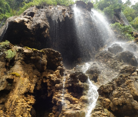 wisata Goa Tetes Lumajang